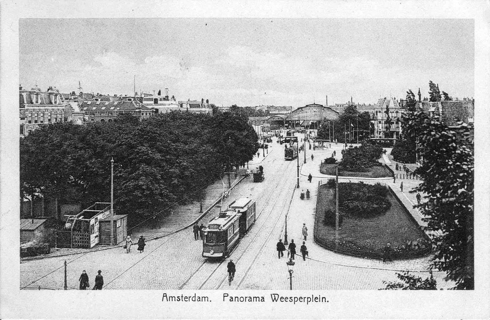 Photographed in Amsterdam between 1900 and 1914.